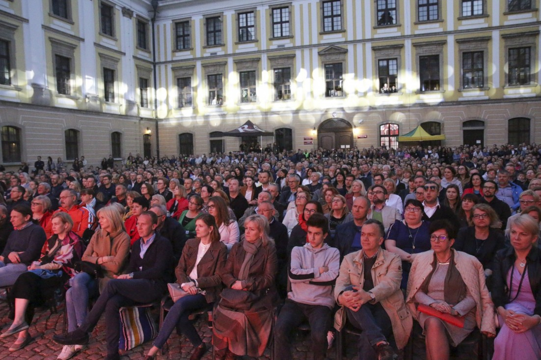 Legnica Cantat 50, rok 2019. Publiczność przed koncertem The Age of Sing na dziedzińcu Akademii Rycerskiej.